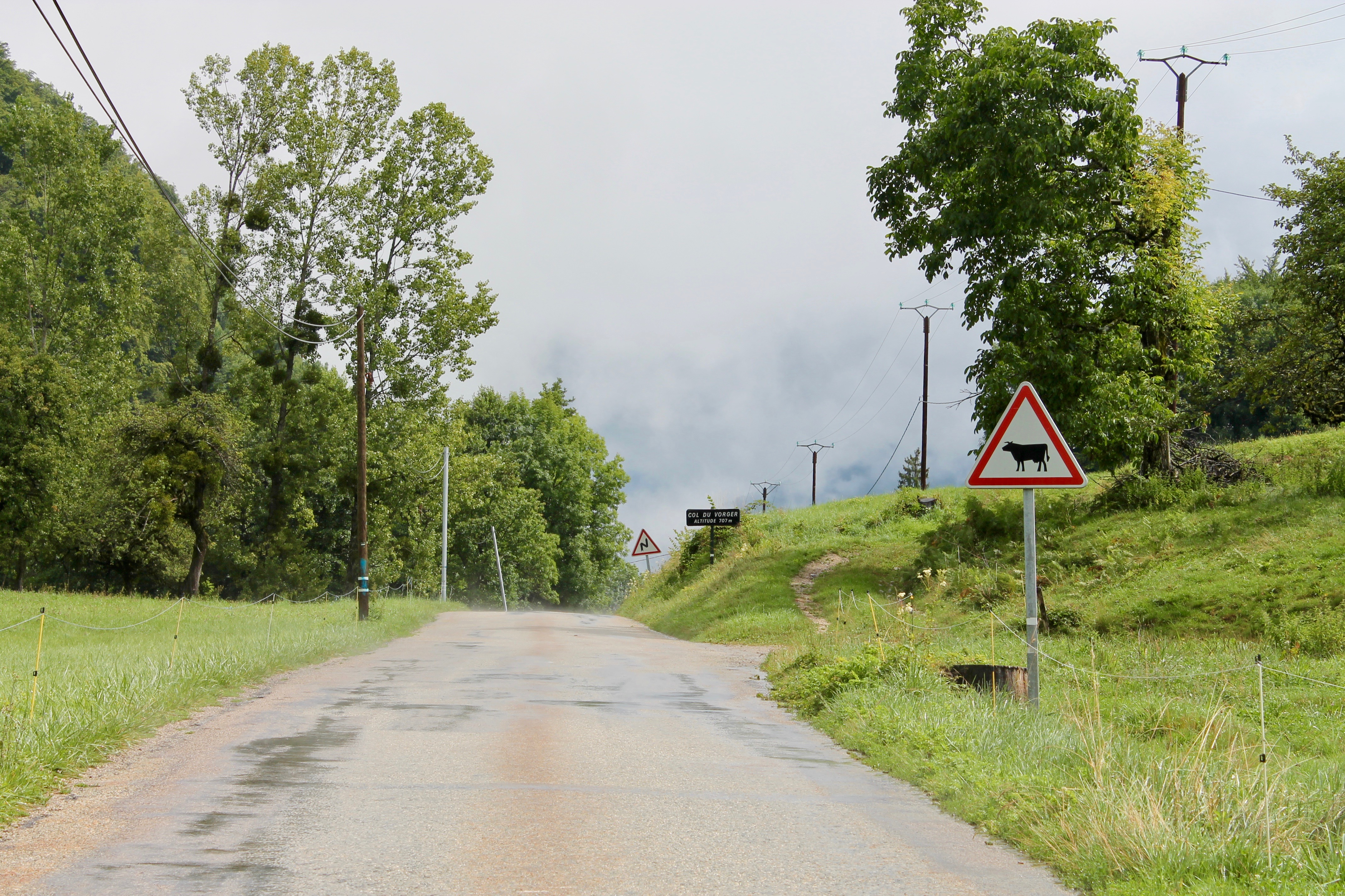 Col du Vorger depuis le chef-lieu d'Allondaz.